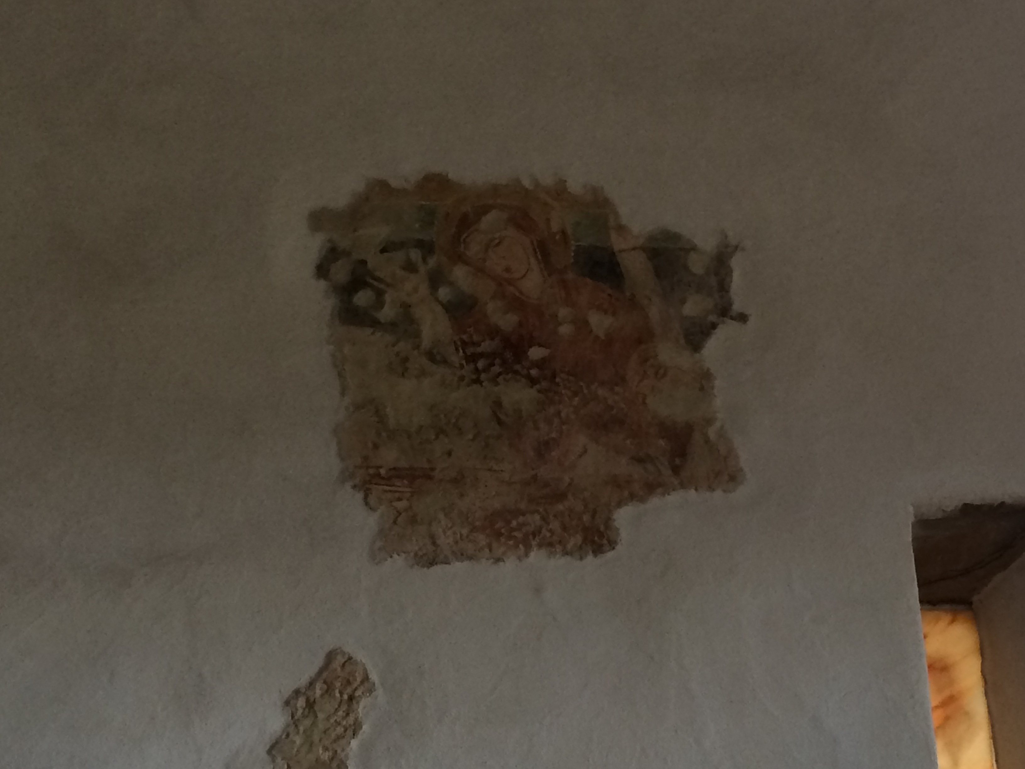 Fagagna-MadonnaTavella-Interno 05